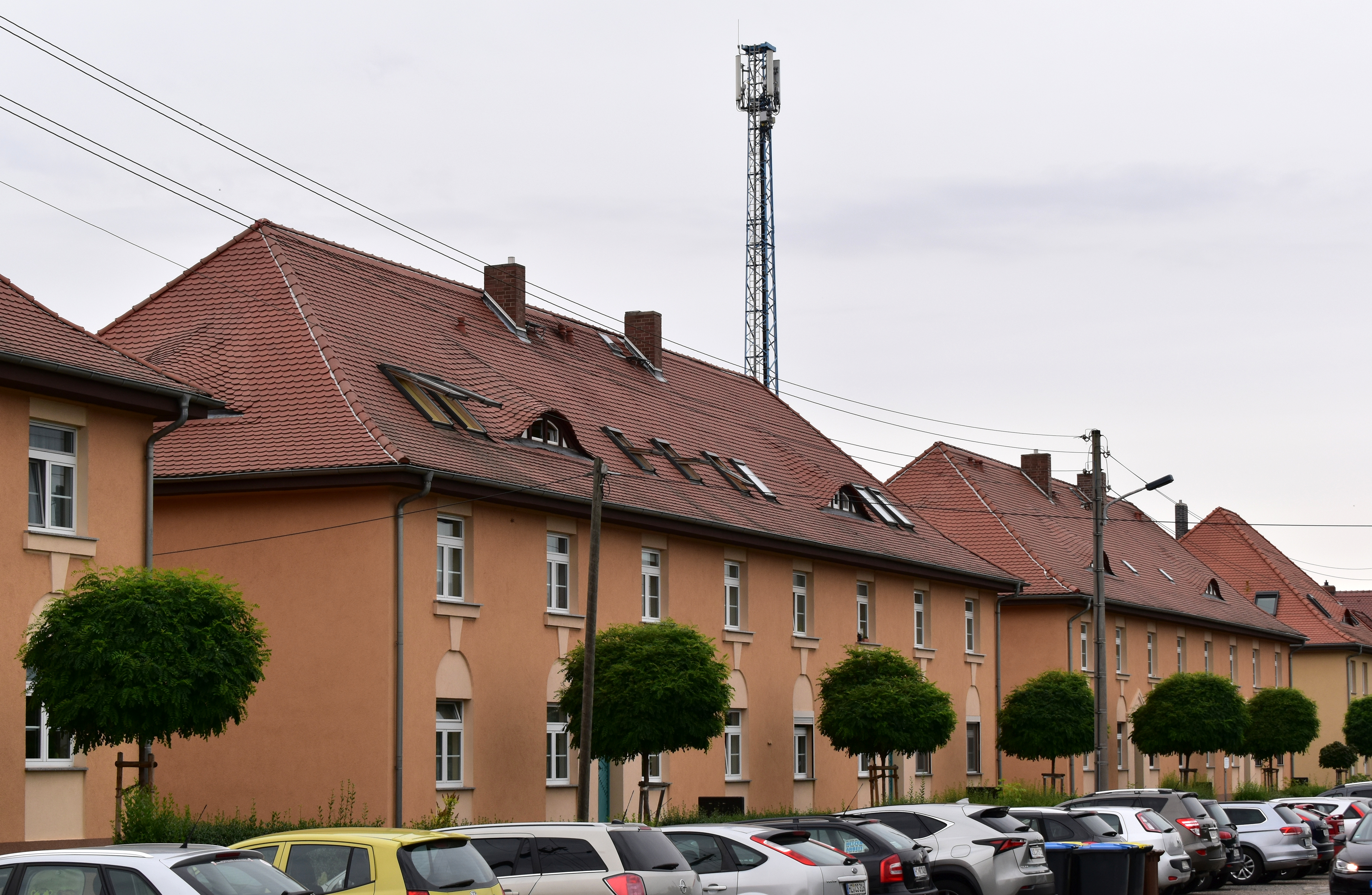 Gebäude Klopstockstraße 28-34 in Aschersleben